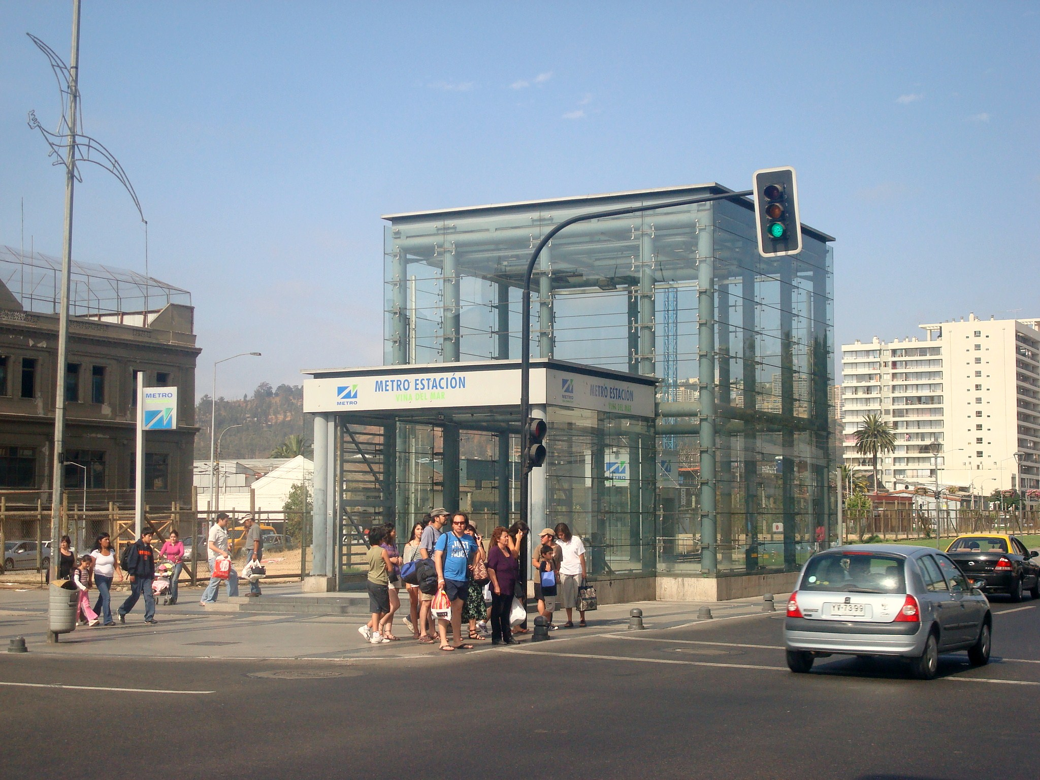 Estación Viña del Mar, Viña del Mar, Chile